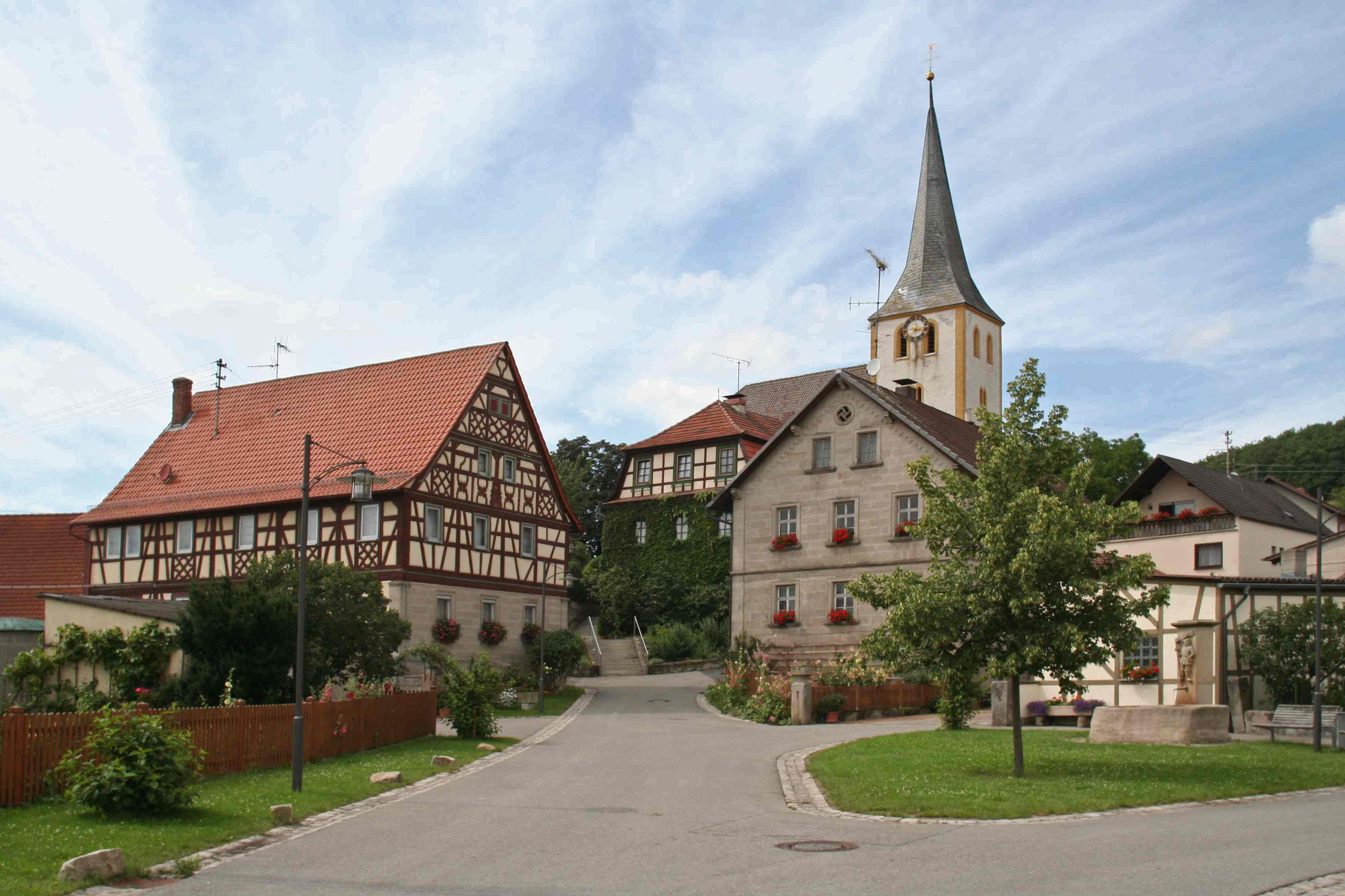 Nassach, Teil der Gemeinde Aidhausen im Landkreis Haßberge in Bayern